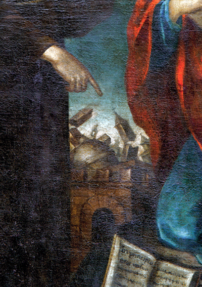 La città di Cento distrutta dal terremoto di Ferrara del 17 novembre 1570. Particolare da un dipinto di Giovanni Battista Tinti (1558-1604) presso la Pinacoteca comunale di Cento.